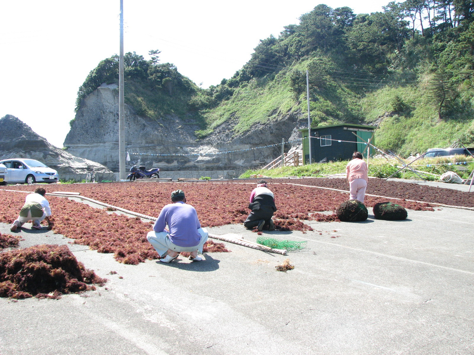 Tengusa(Agar seaweed) drying up at Izu(テングサ干し・伊豆)